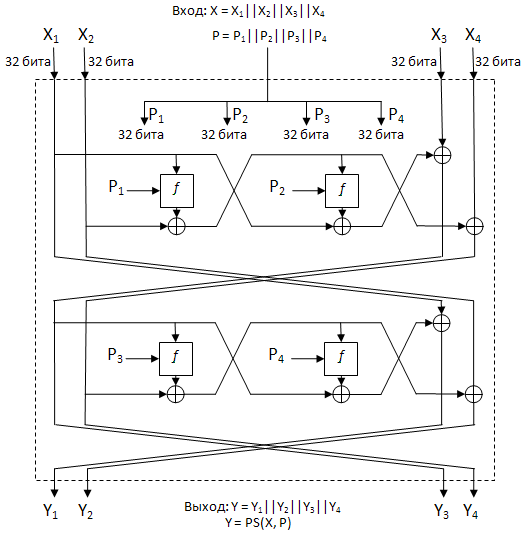 схема поиска функции